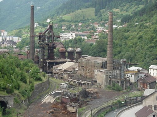 dean-visoka peć u majdanu